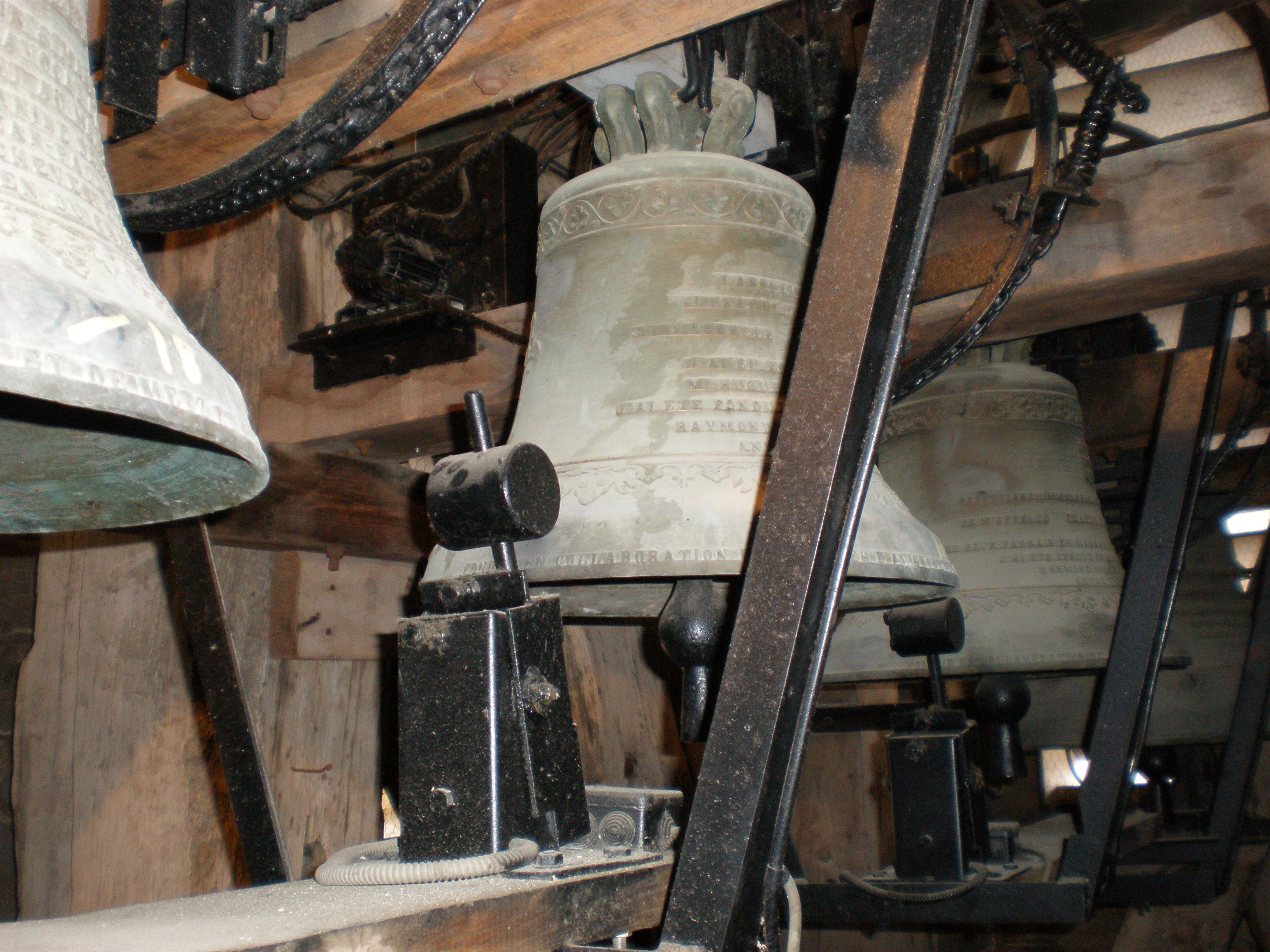 Quelques cloches du carillon de la cathédrale Notre-Dame des Doms d'Avignon